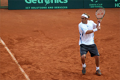 26-тия в света Маркос Багдатис; Пловдив, Купа Дейвис: България - Кипър 3:2; 2007 Пламен Ташев, Тенис